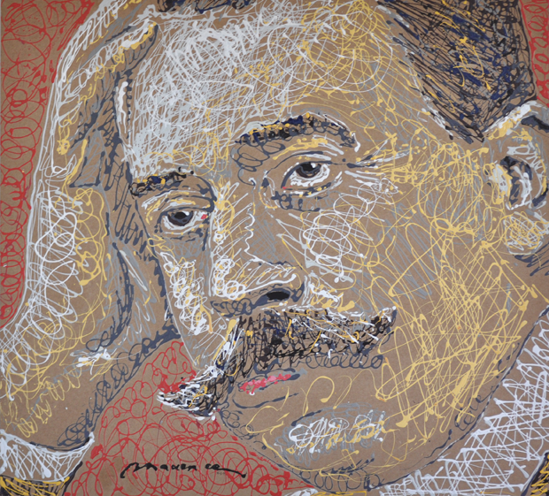 120x110cm Peinture filament © 2013 VILLE DE RIOM